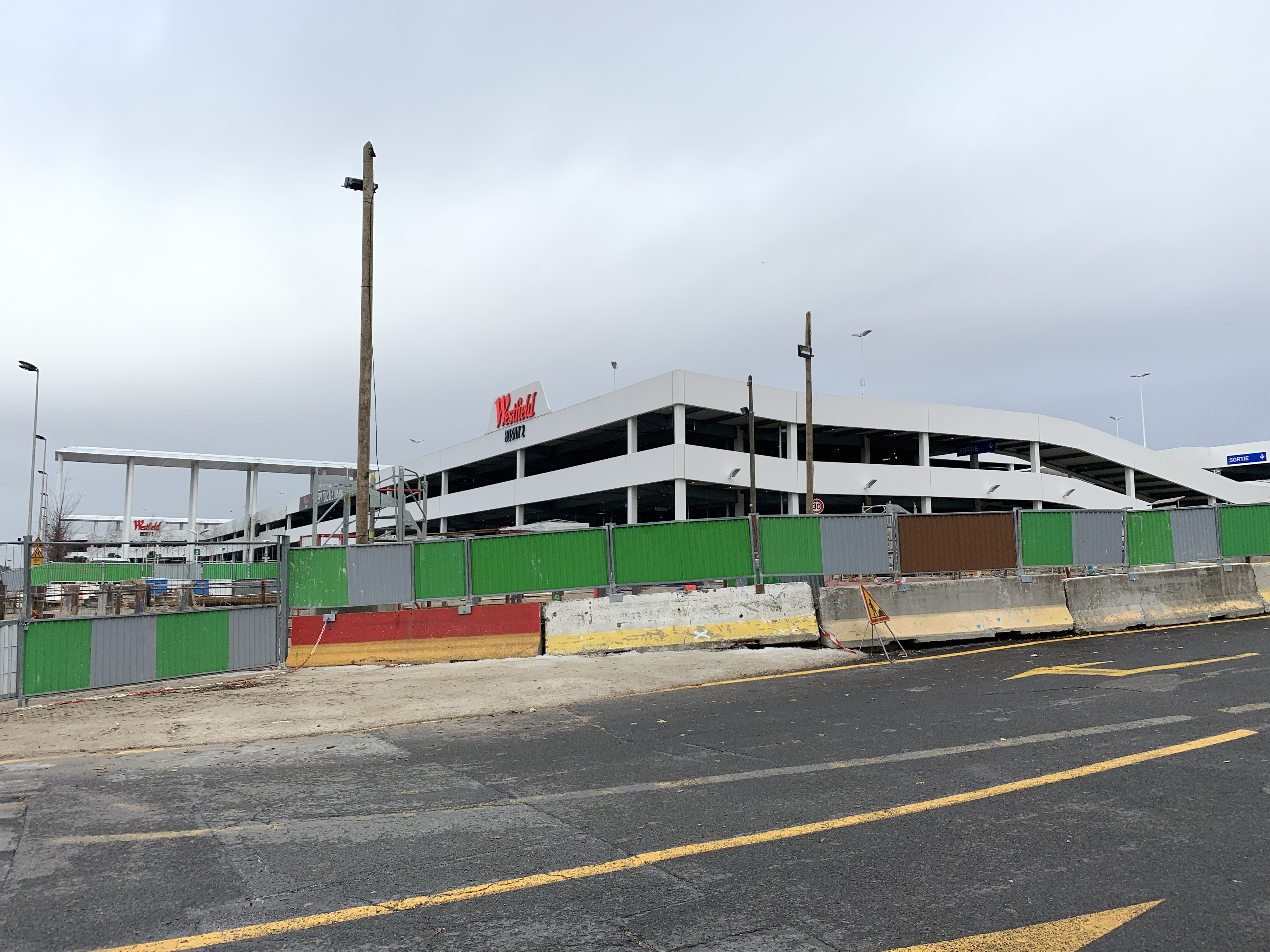 Chantier de construction la ligne 11 du métro de Paris le long de la rue Léon Blum, Rosny-sous-Bois.